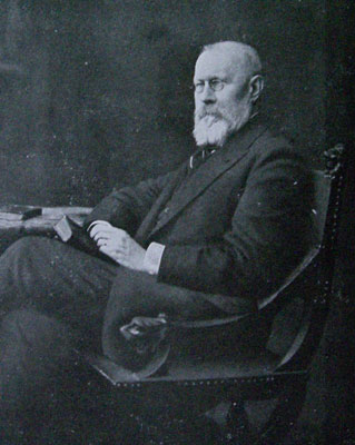 French mathematician Paul (Émile) Appell (1855-1930)